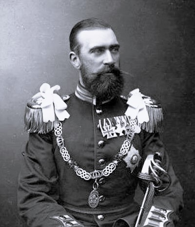 Portrait of Adolf Friedrich V, Grand Duke of Mecklenburg-Strelitz (1848-1914)